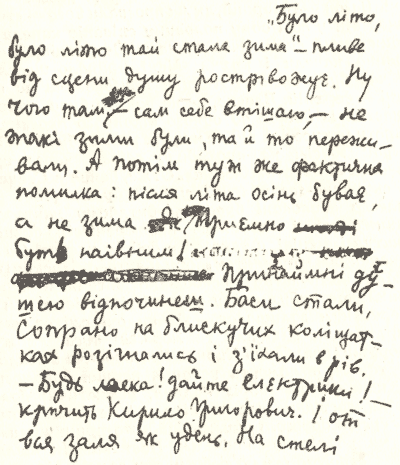 Автограф П. Тичини (спогади про мандрівку з капелою Стеценка)